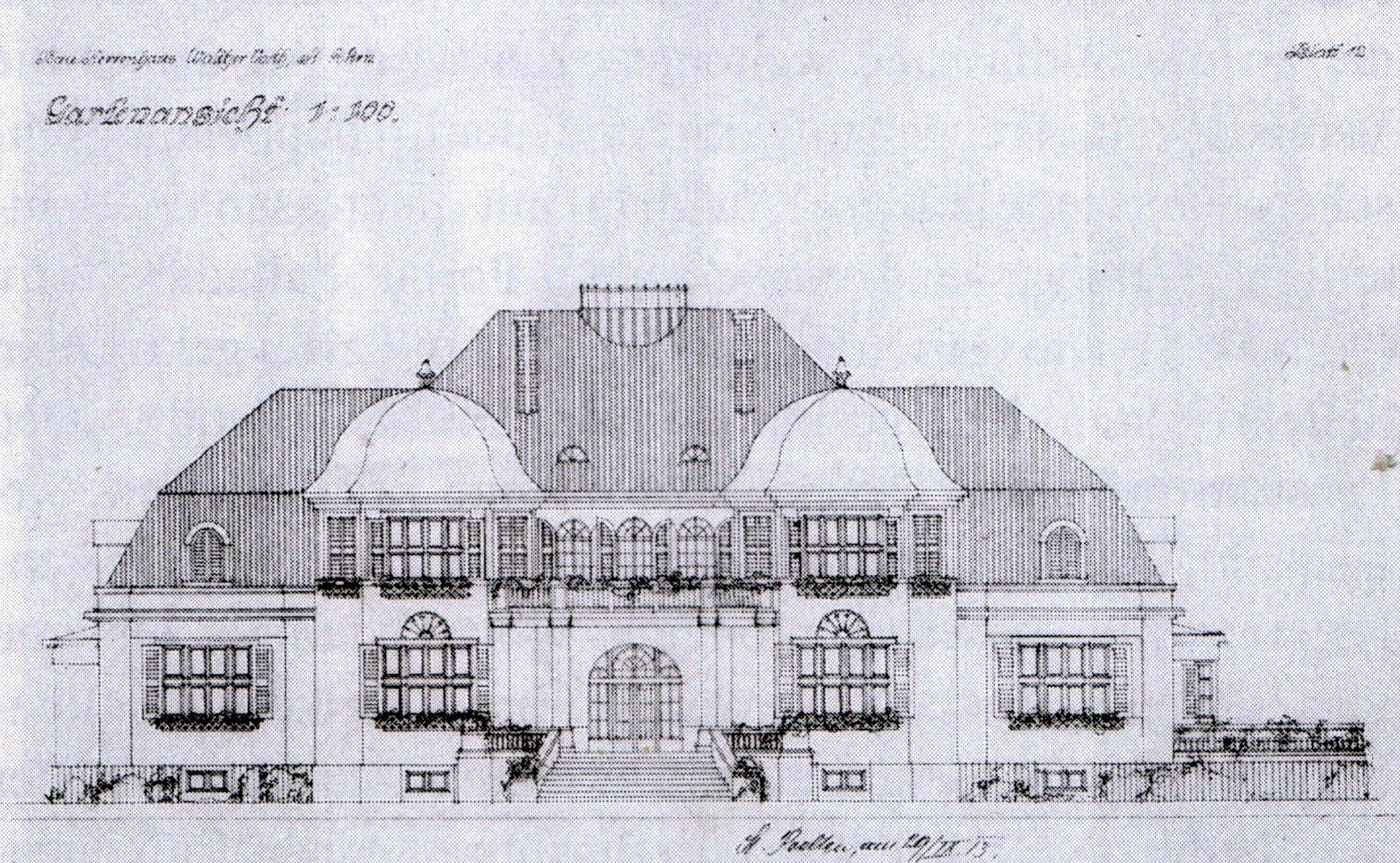 Plan der Voithvilla aus 1913